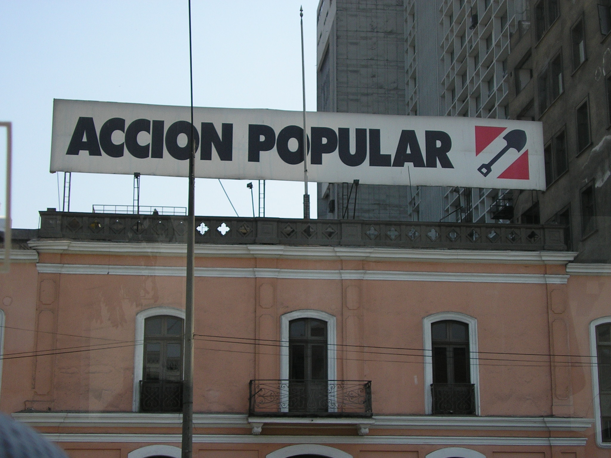 Accion Popular banner in Lima, Peru.